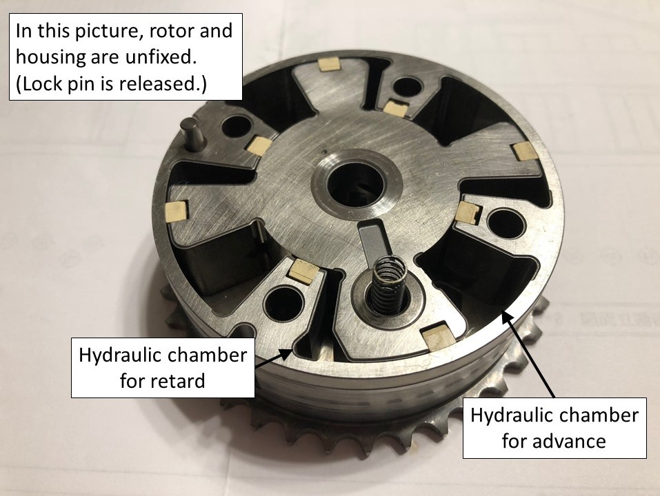 トヨタ2ZR-FXE型エンジンのVVT内部構造(ロック解除時)